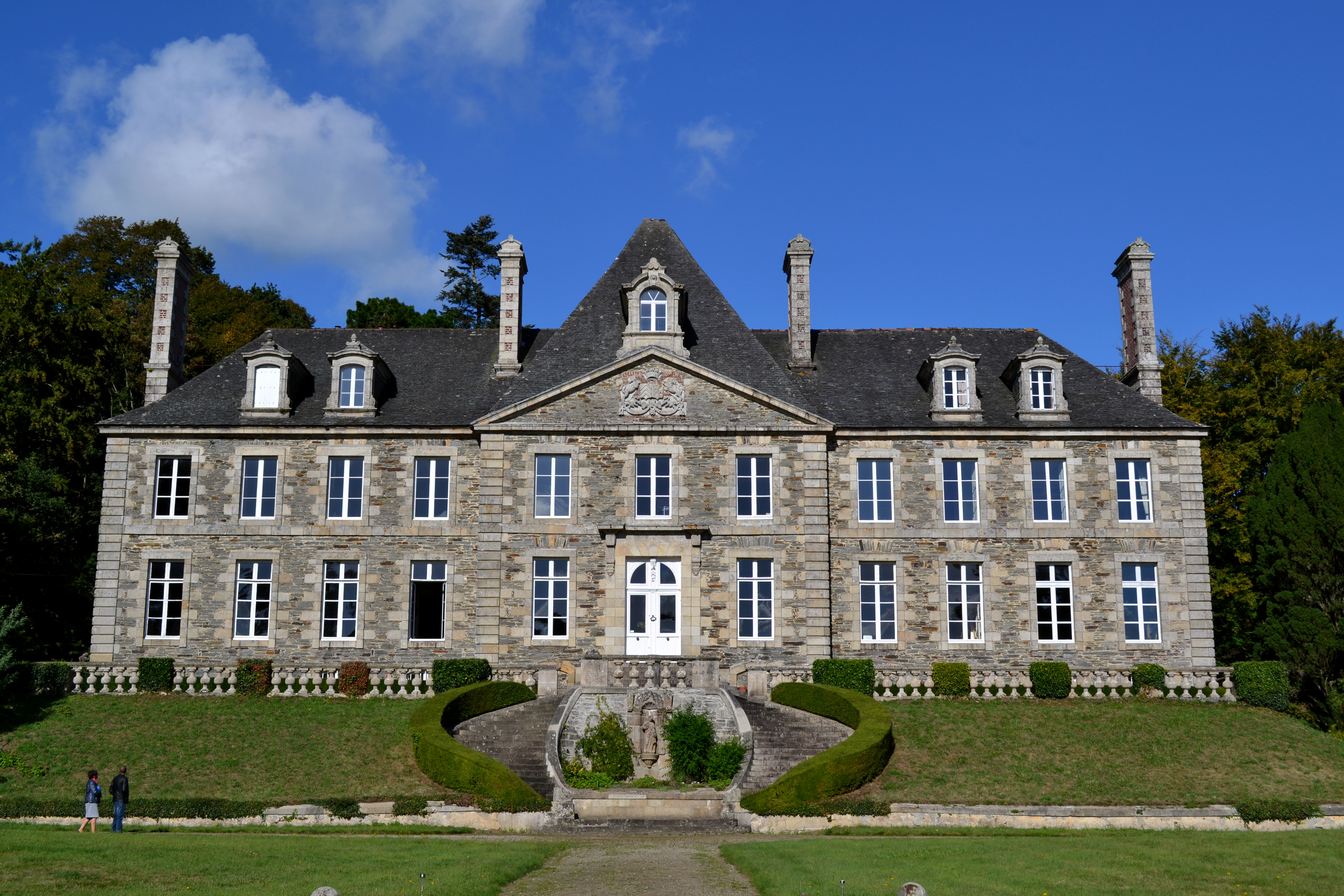 Château de Kéranroux (XVIIIe siècle) à Ploujean (Morlaix, Finistère).